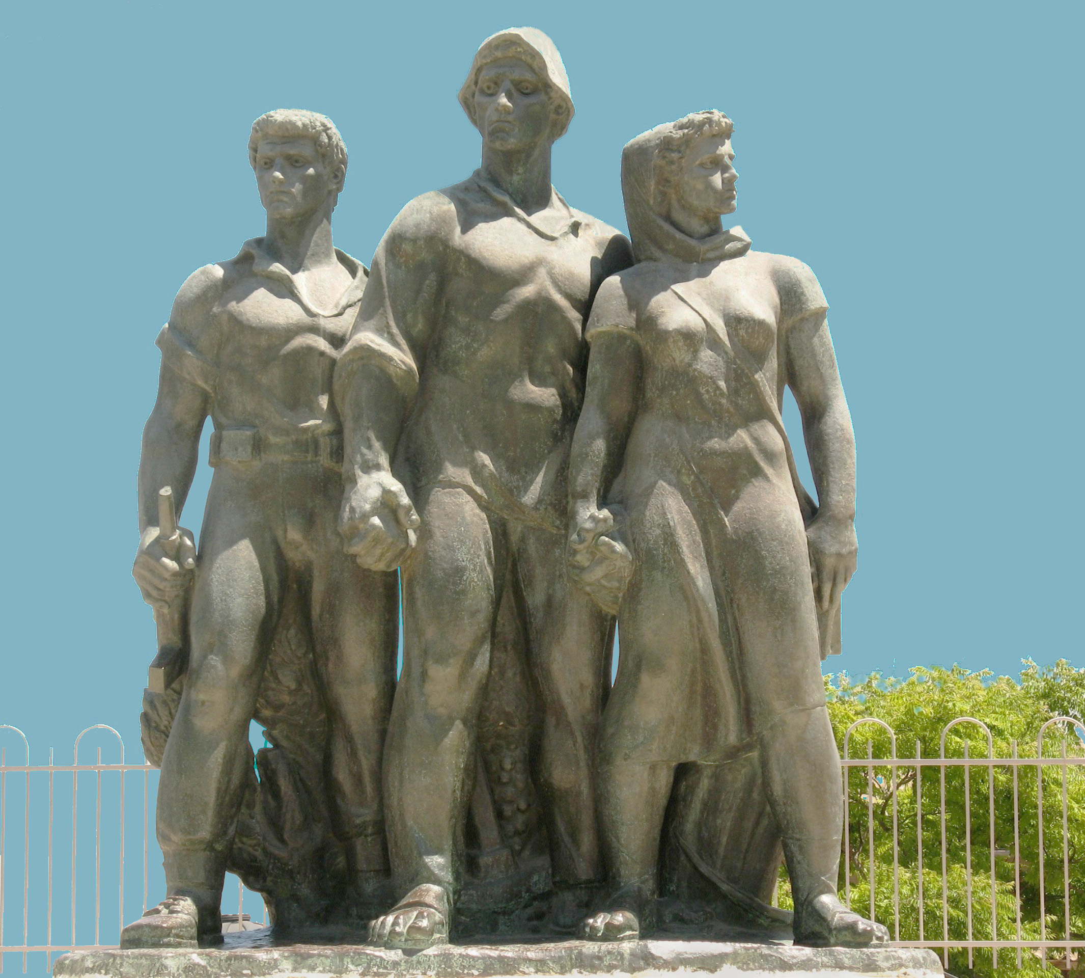 אנדרטה למגיני נגבה, בקיבוץ רישיון נוצר על ידי משתמש:שנילי